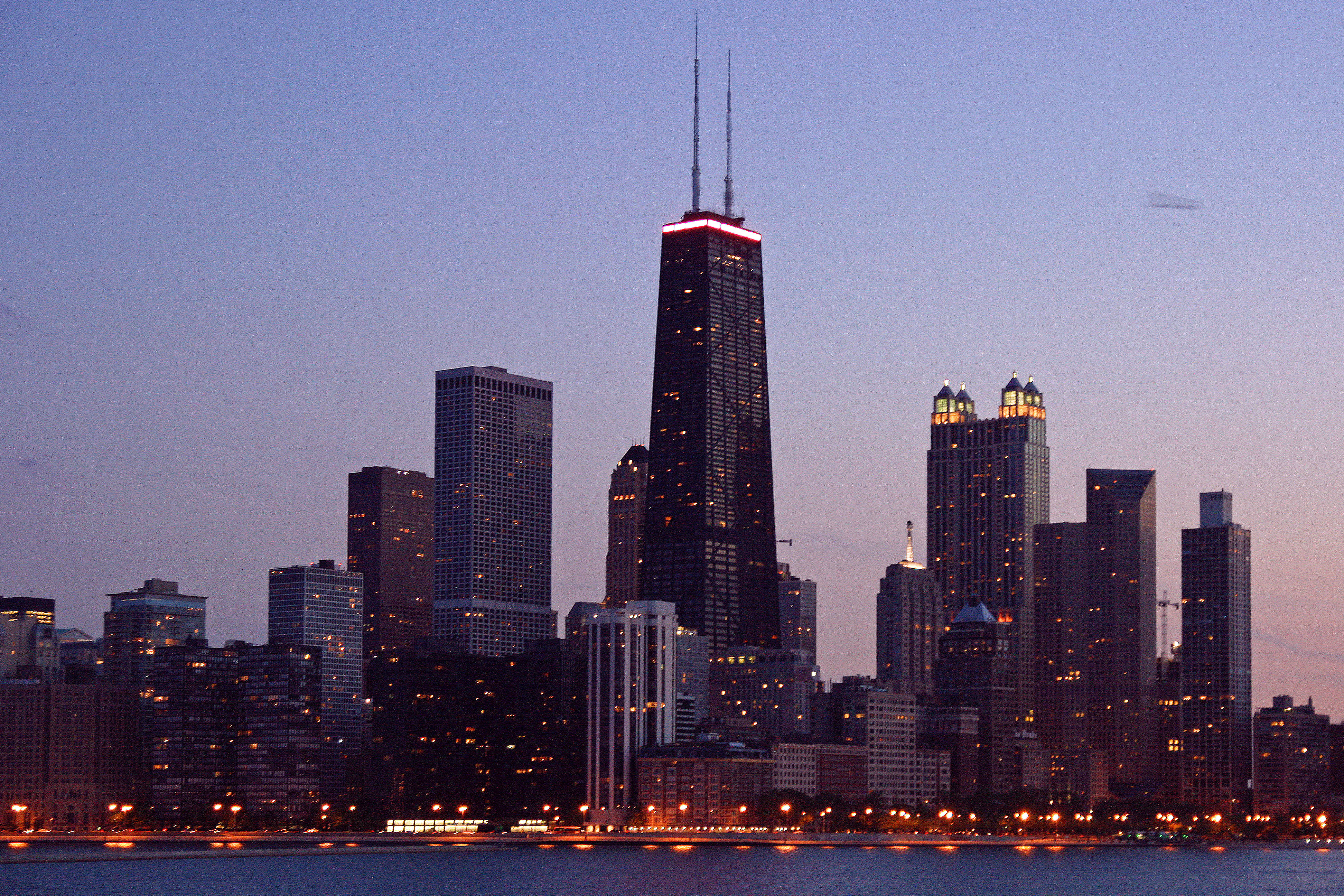 ... evening skyline